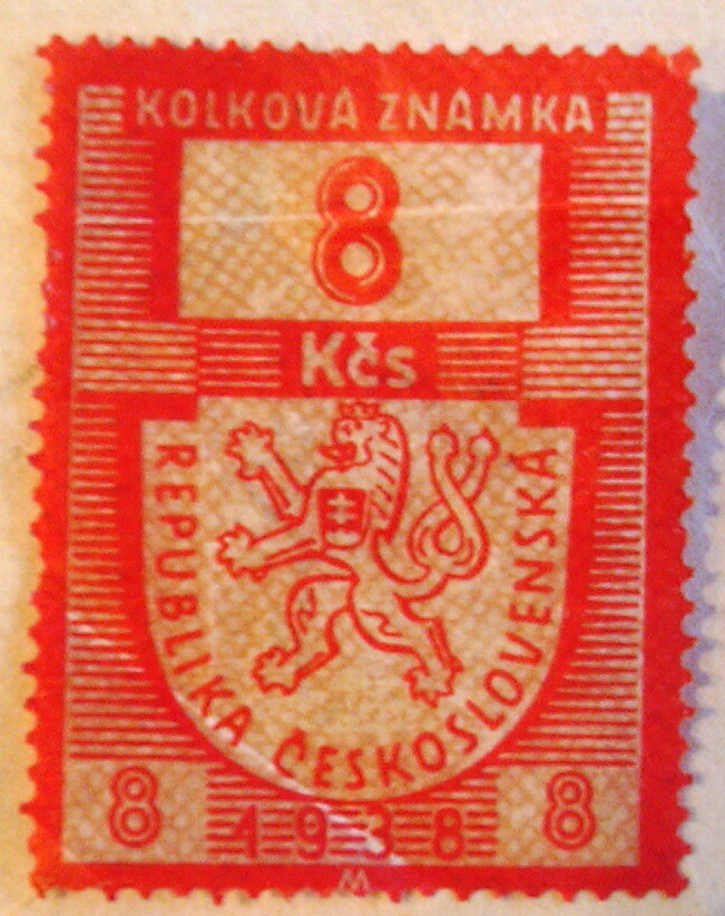 8 Kčs - kolková známka z roku 1938 Czech republic